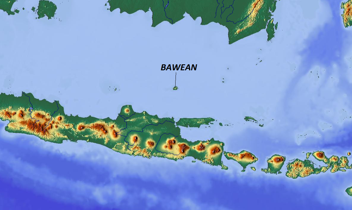 Map showing Baewan